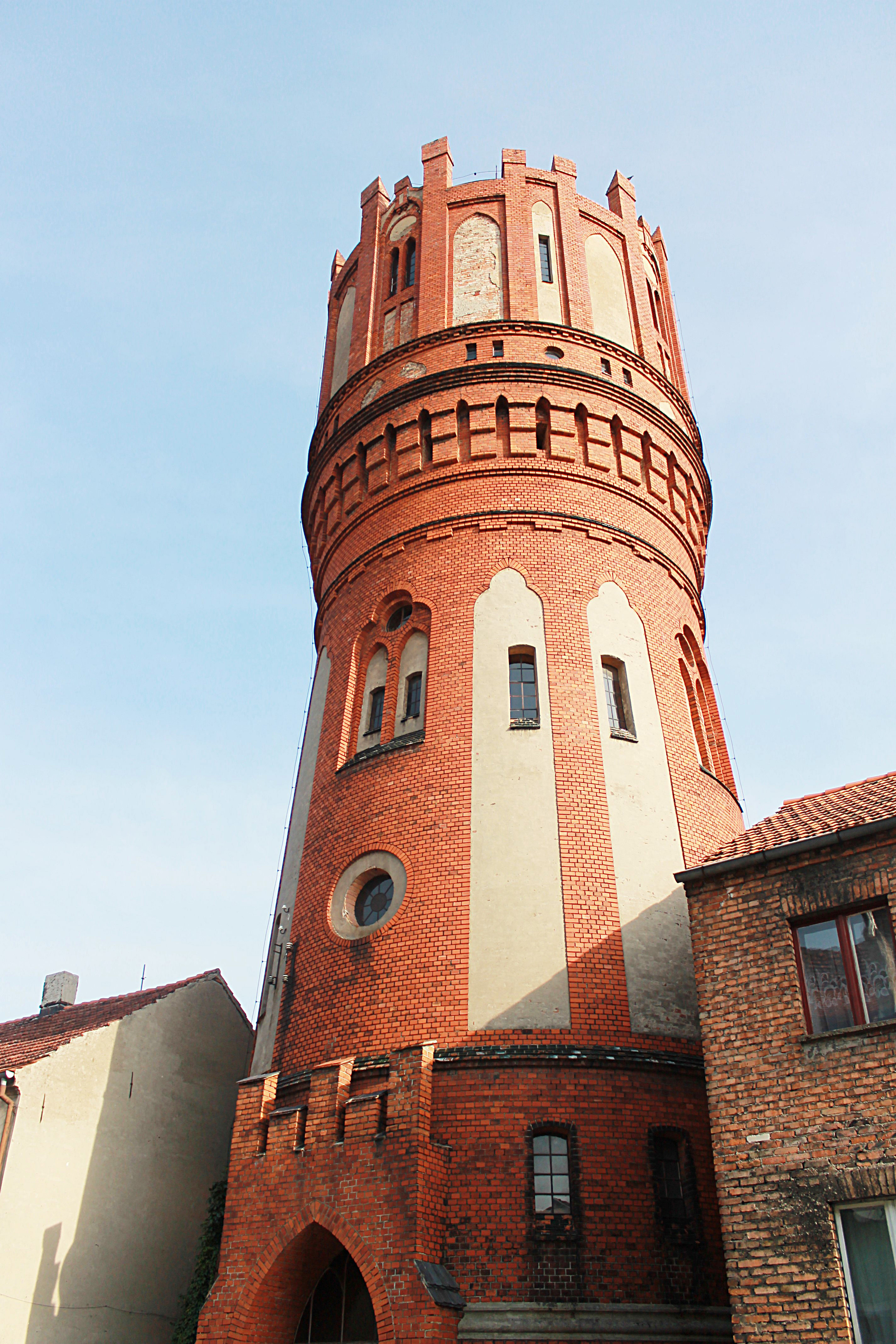 Chełmno, ul. Dominikańska - wodociągowa wieża ciśnień, 1899 r.